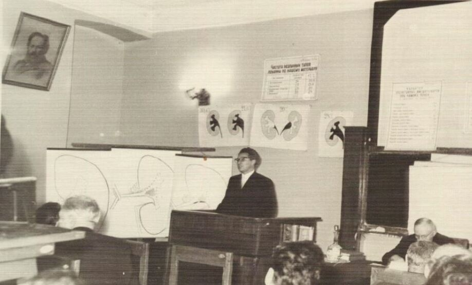 1958 Moritz Mebel bei der Verteidigung seines "Kandidaten der medizinischen Wissenschaft" (russ.), entspricht dem Dr. med., am Lehrstuhl für Urologie des Zentralinstitutes für ärztliche Fortbildung in Moskau